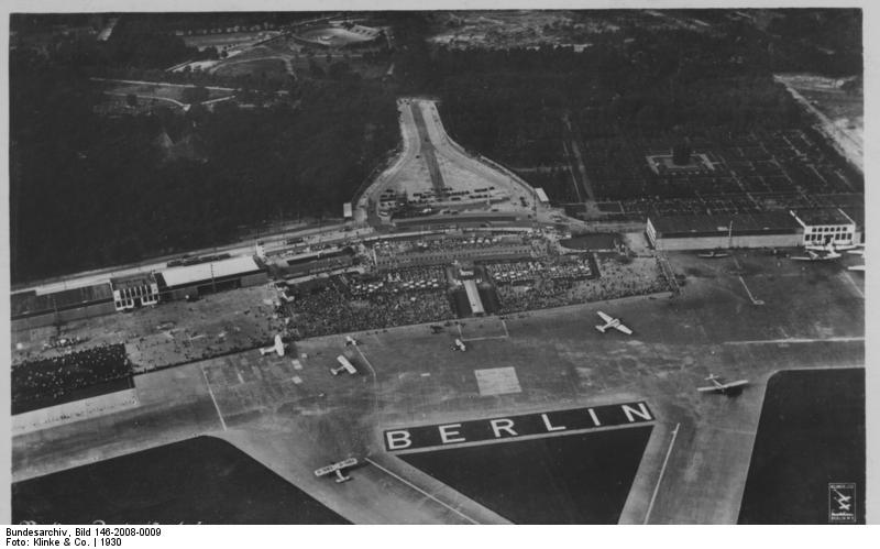 Berlin, Zentralflughafen Fliegerfoto aus etwa 450 m Höhe. Geprüft und freigegeben Bildstelle R.L.M. 1930 (Nr. 9201/Neg. 6446)